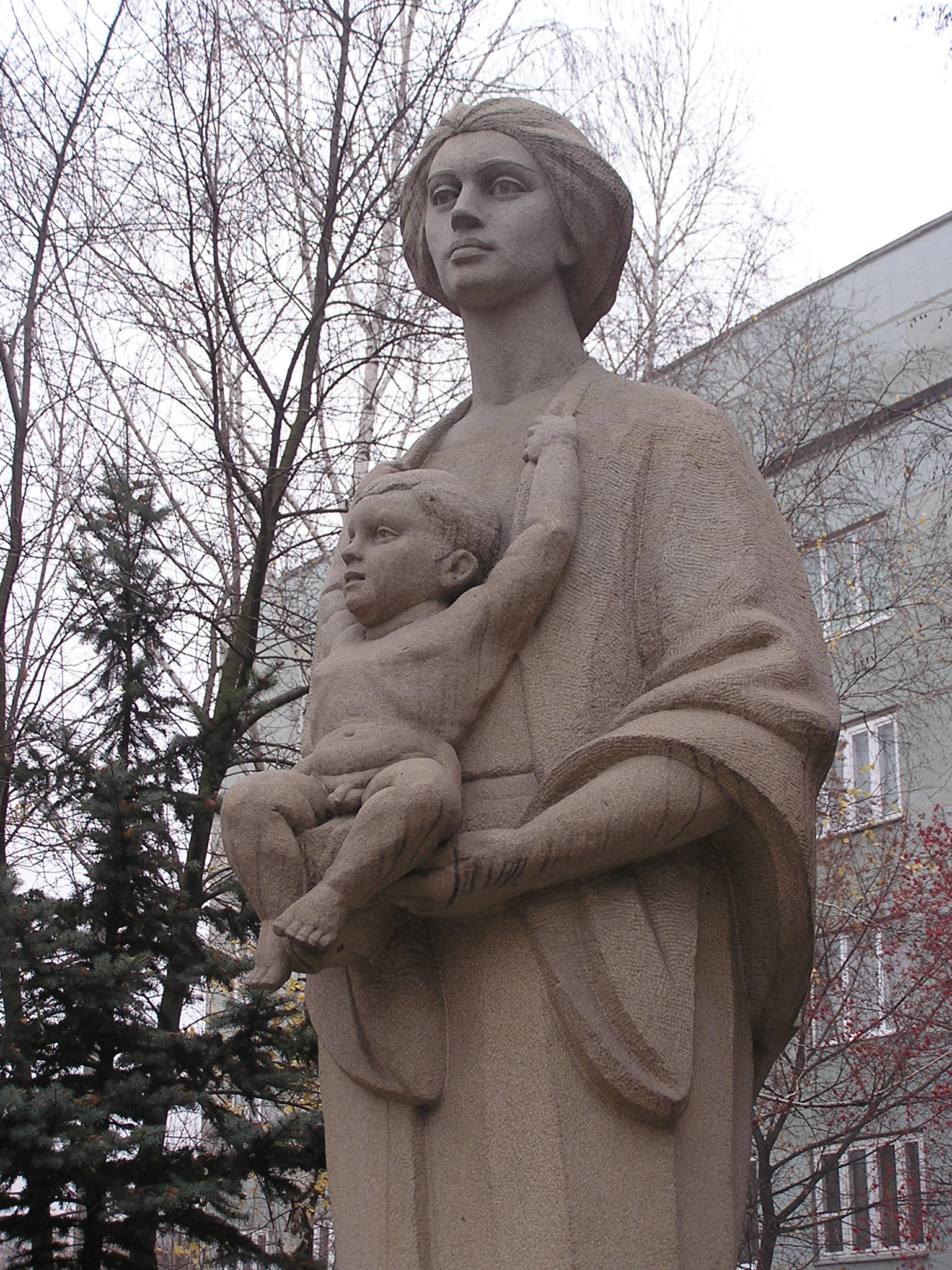 Донецк. Памятник матери